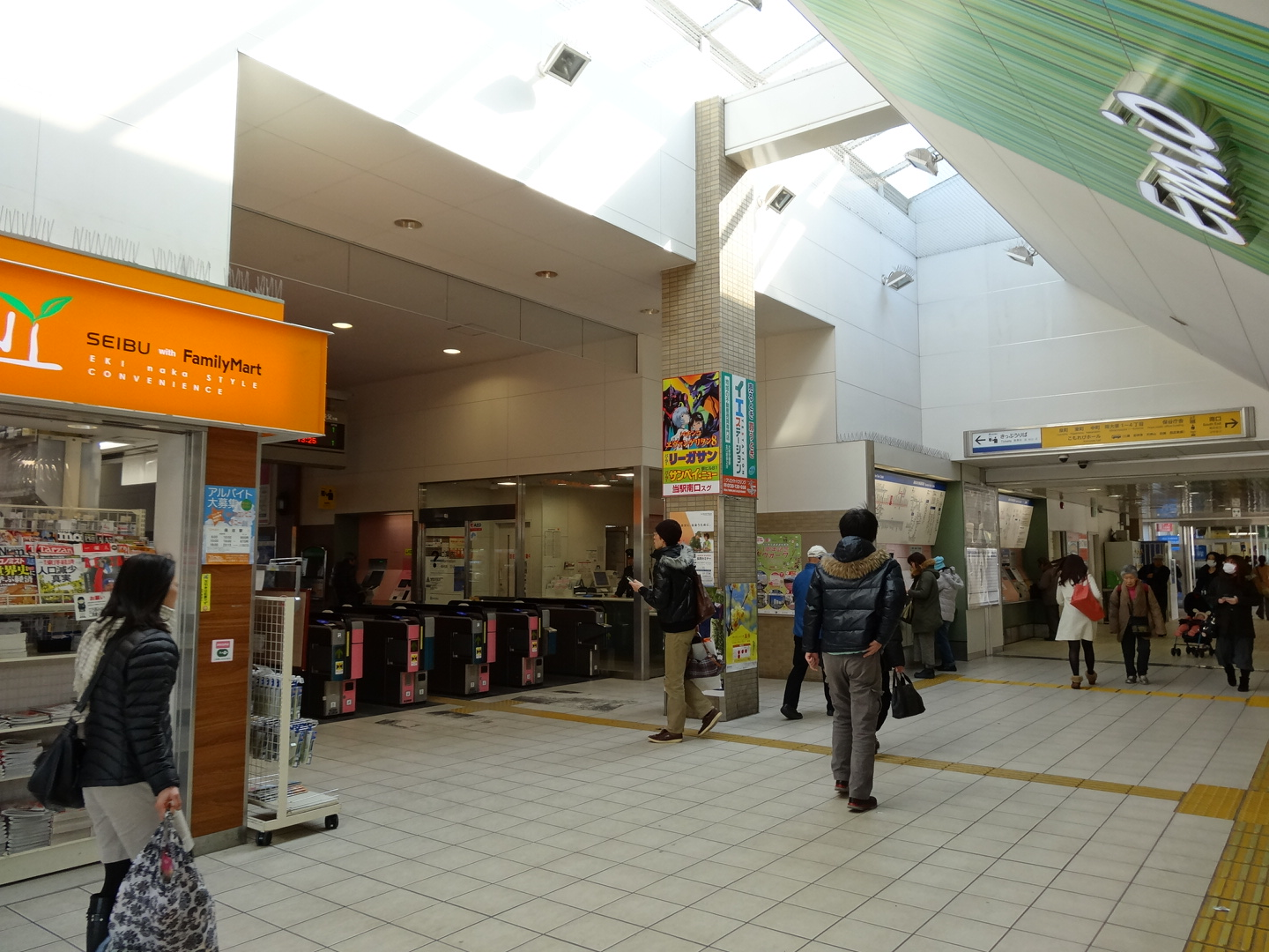 Hoya-station-entrance 2014/02/17